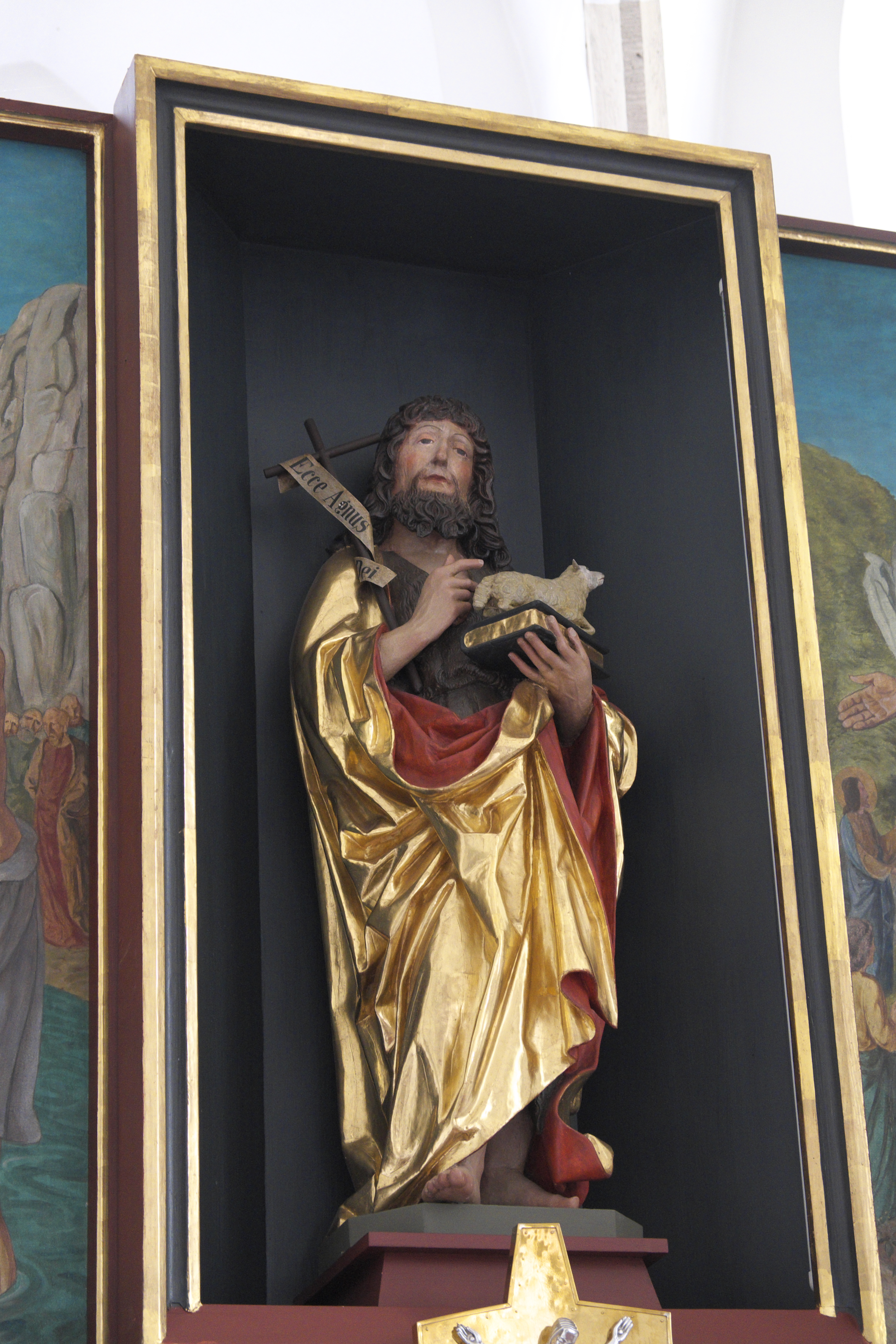 Ehemalige Johanniterkirche, heutige Pfarrkirche St. Johannes in Altmühlmünster (Riedenburg) im niederbayerischen Landkreis Kelheim (Bayern/Deutschland), moderner Hochaltar mit Schnitzfigur Johannes des Täufers, Anfang 16. Jahrhundert